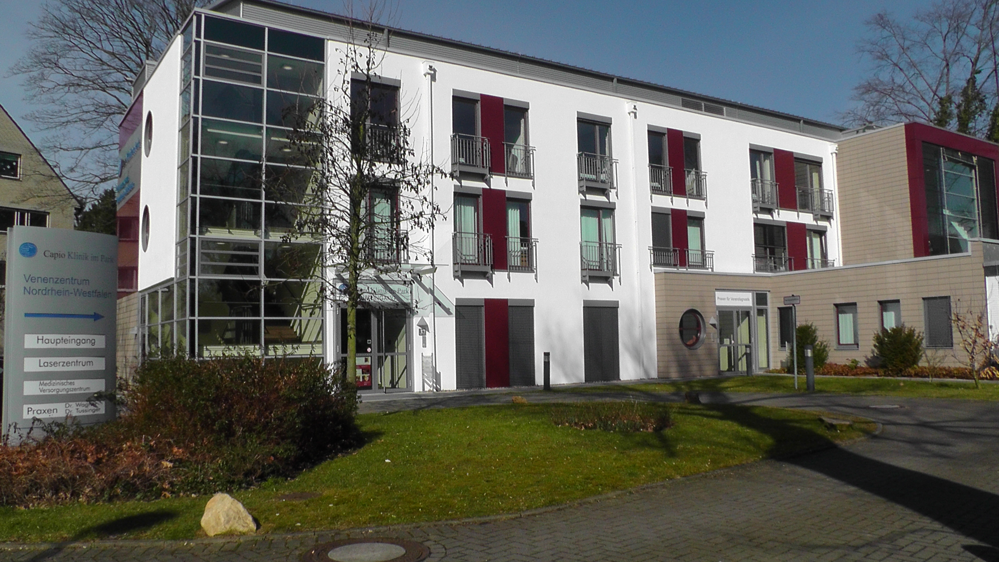 Hilden, Hagelkreuzstraße 37, Capio Klinik Neubau